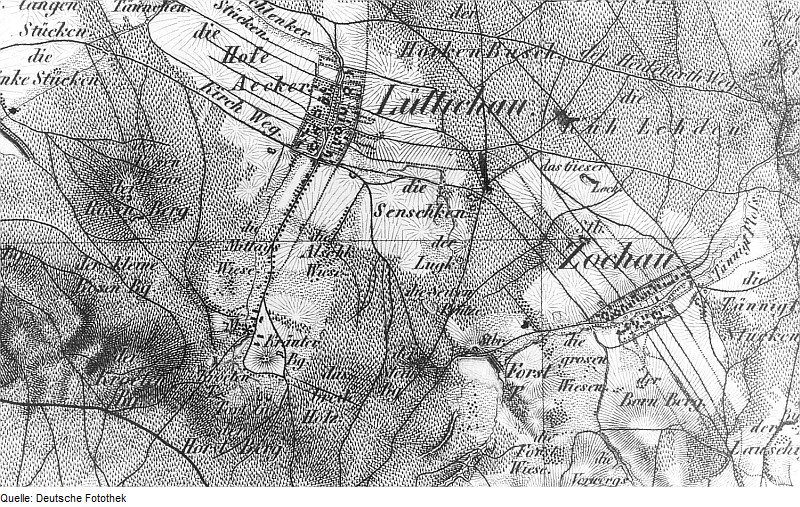 Original image description from the Deutsche Fotothek Thiendorf-Lüttichau. Oberreit, Sect. Großenhain, 1841/43